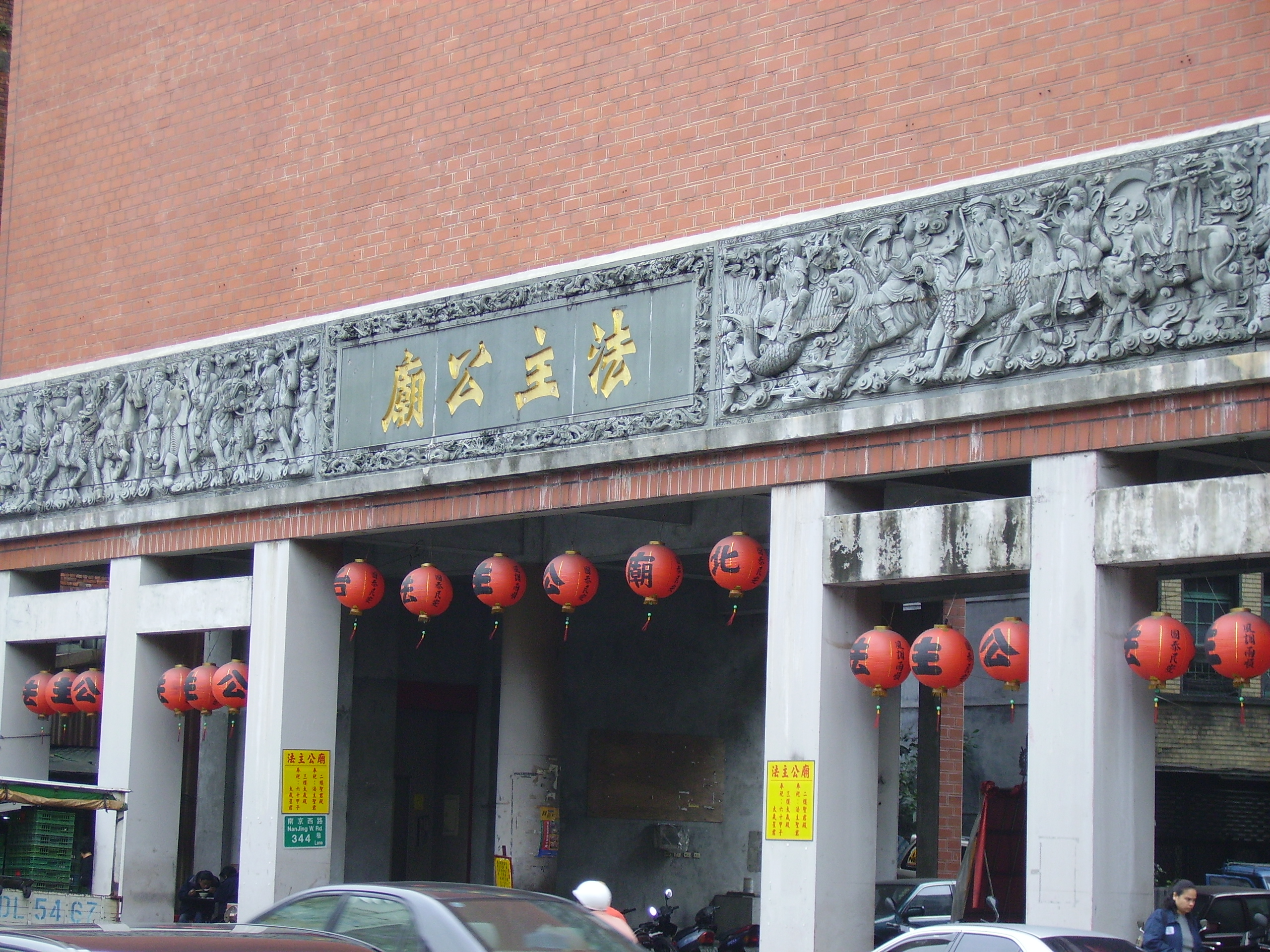 法主公廟，位於臺北市大同區南京西路344巷2號。